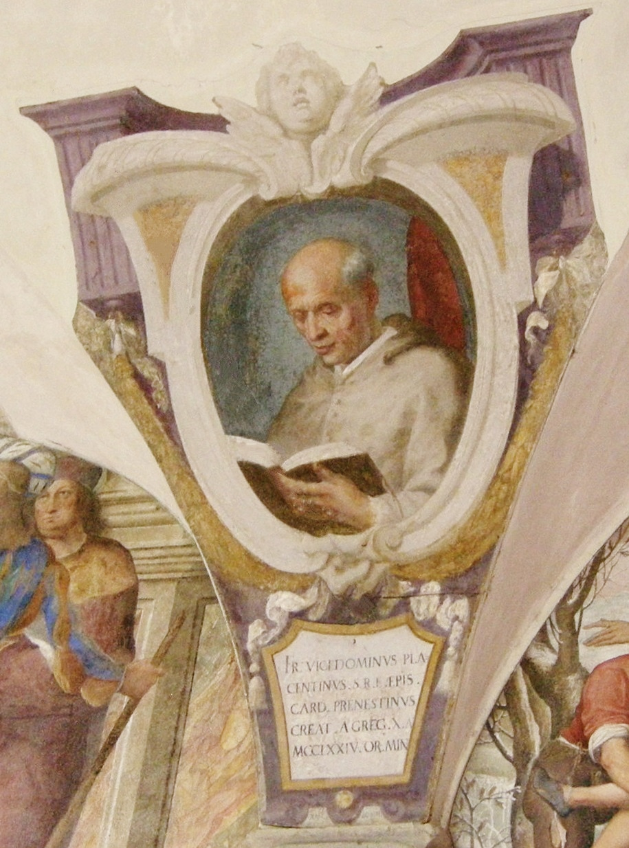 Chiostro di ognissanti, personalità francescane 06 Vicedomino Vicedomini